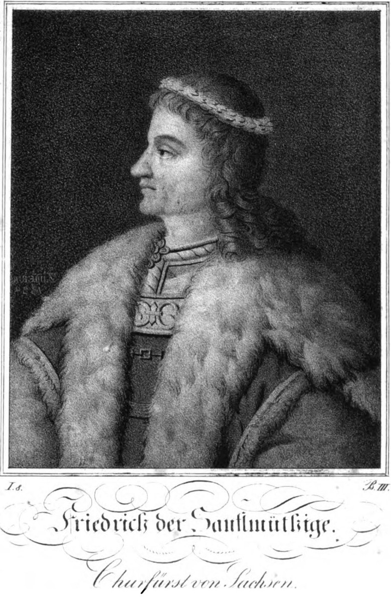 Saxonia Museum für saechsische Vaterlandskunde. Band 1. Dresden: Pietzsch und Comp. Siehe File:Saxonia Museum für saechsische Vaterlandskunde I.djvu